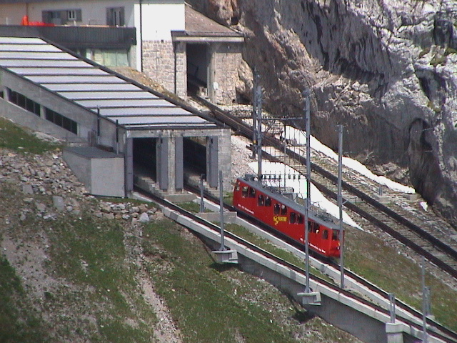 Pilatus-Bahn bei der Einfahrt in die Bergstation